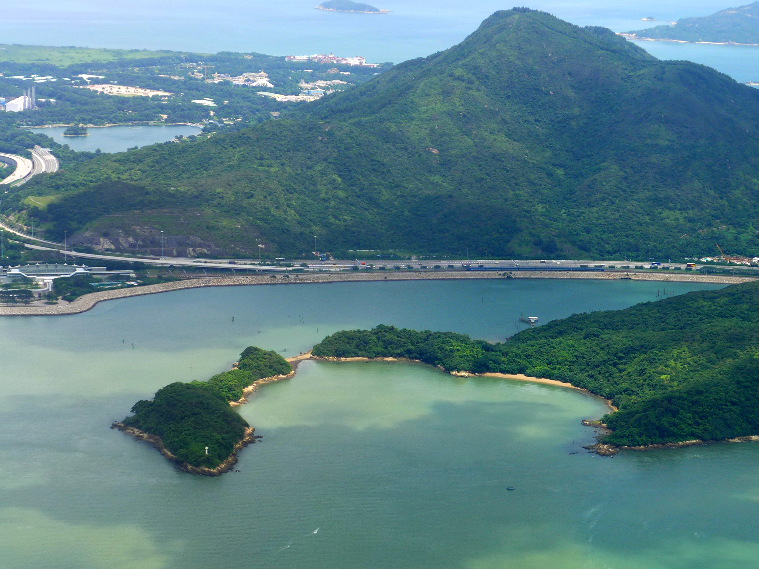 Cheung Sok